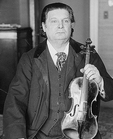 Belgian violinist and composer Eugène Ysaÿe (1858-1931)